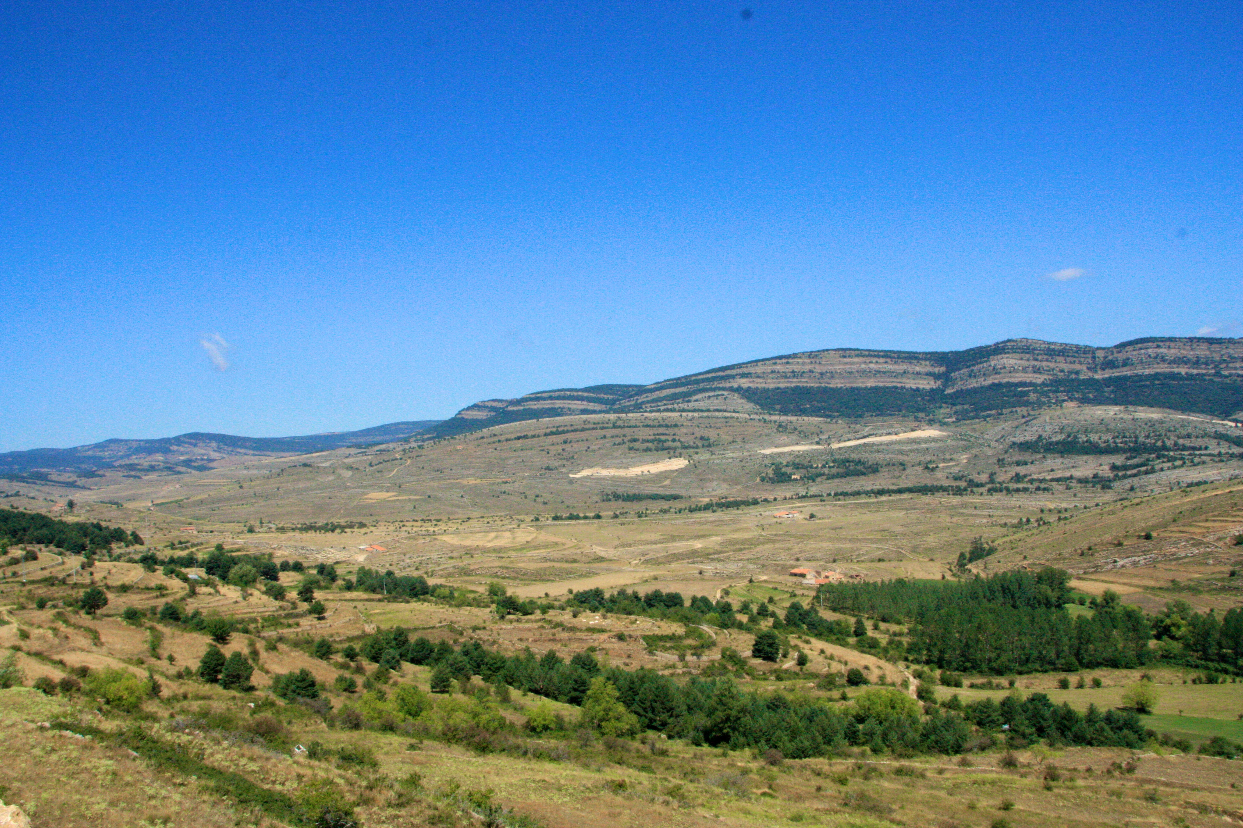 Puertomingalvo